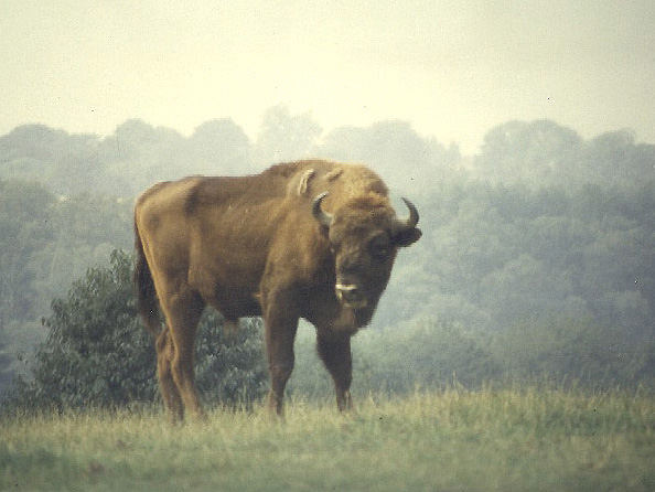 Wisent (Bison bonasus) im Freigehege Neandertal, Mettmann